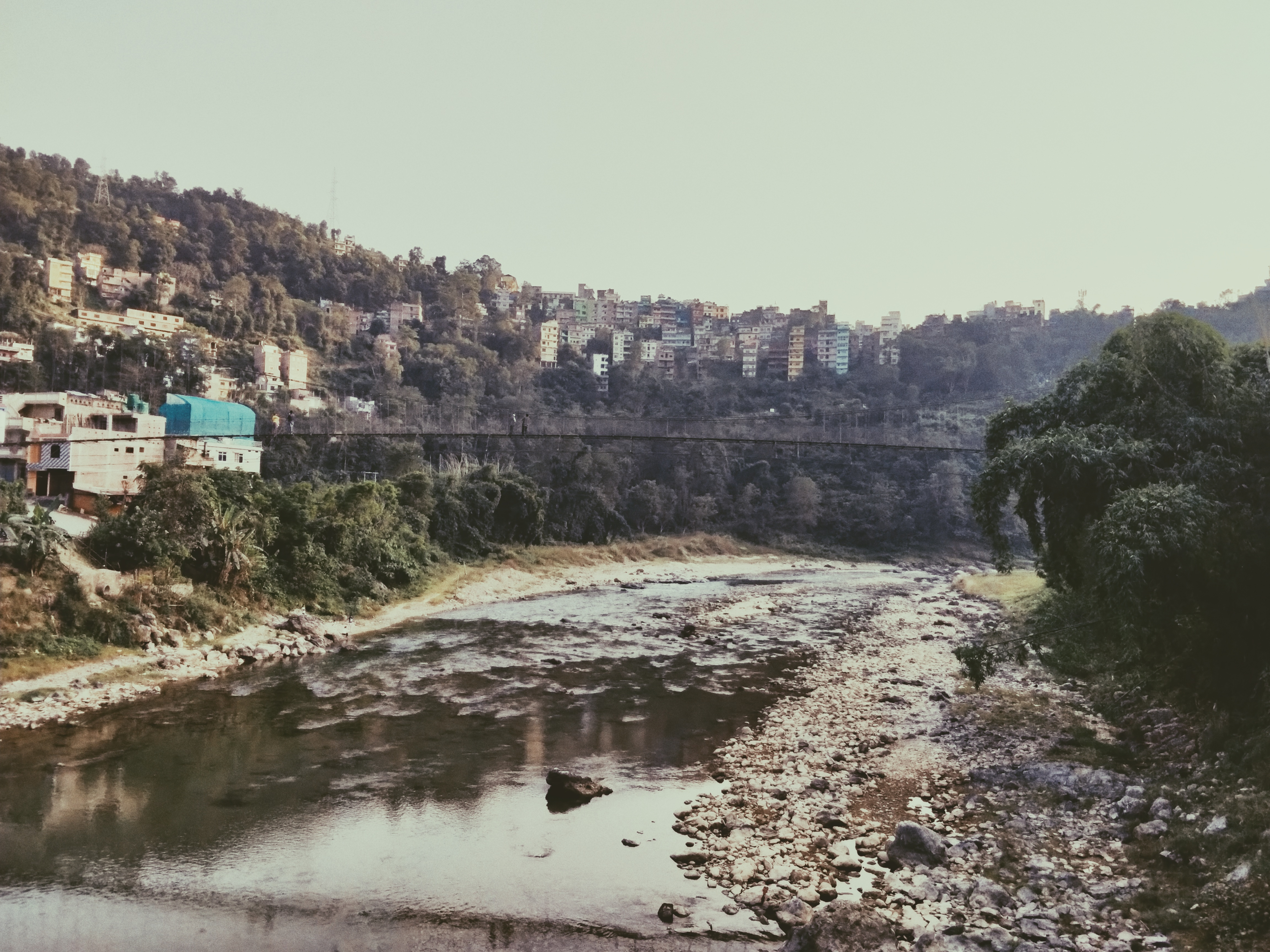 नेपाली: अधीखाेला नदी र गल्याग शहर